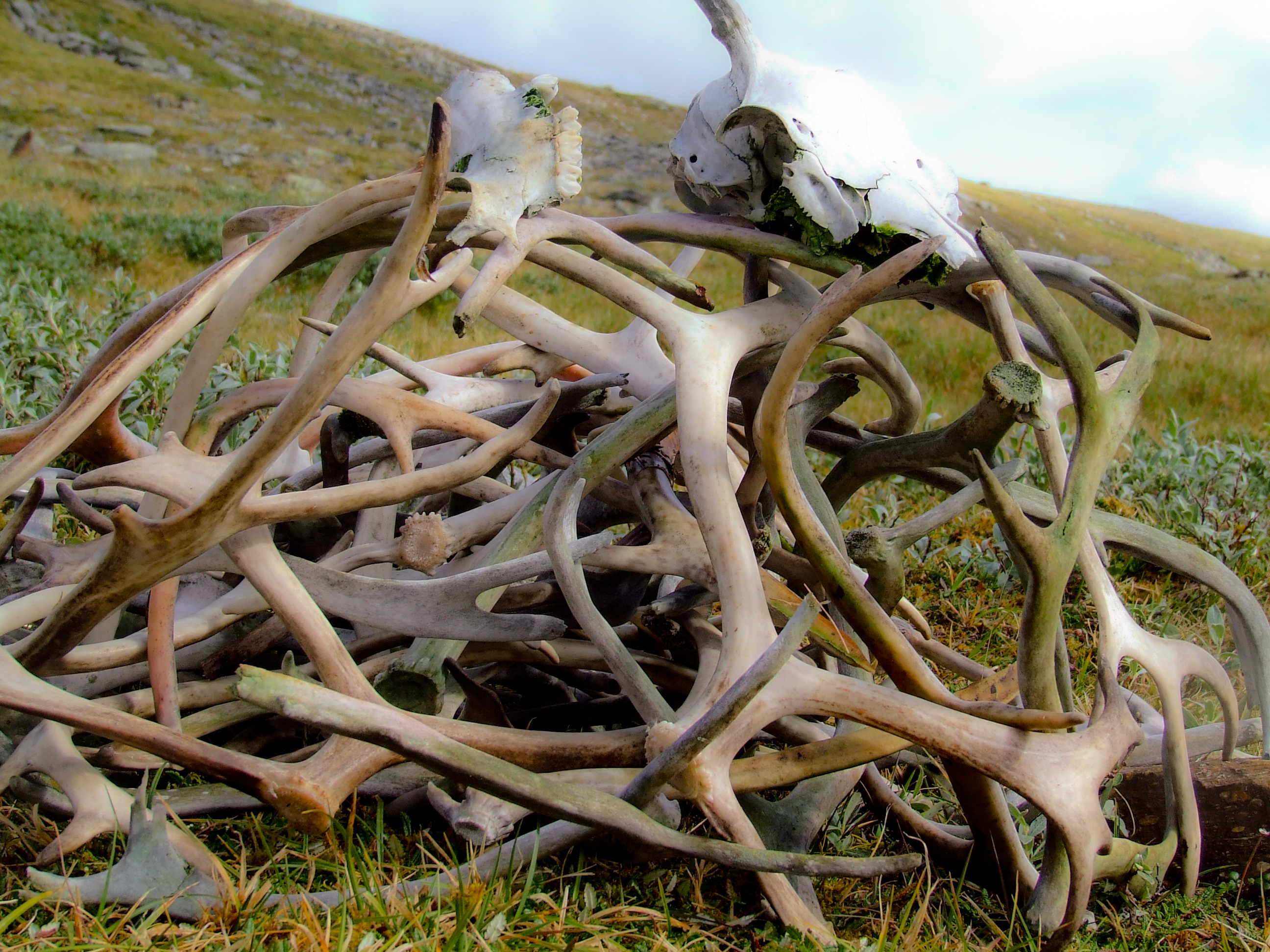 Haufen von Rentiergeweihen mit Schädelteilen im Fjäll von Abisko (Nord-Schweden)